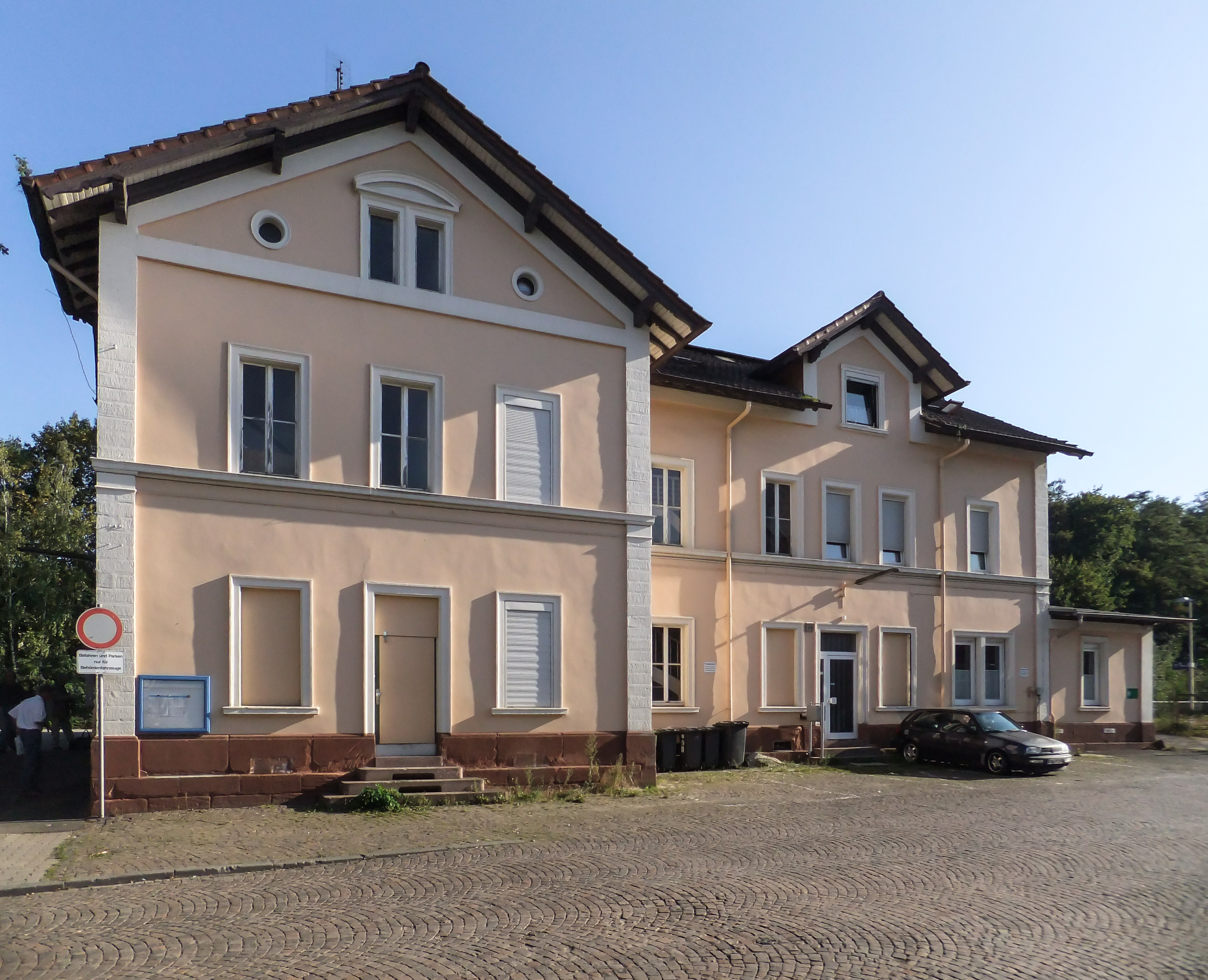 Das Bahnhofsgebäude des Bahnhofs Eisenberg (Pfalz) in Eisenberg (Pfalz) in Rheinland-Pfalz (Deutschland)